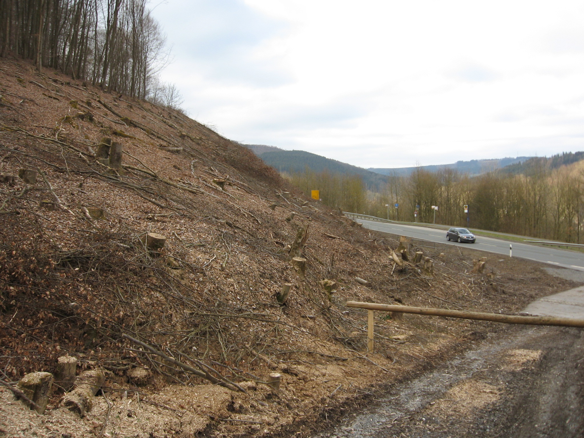 Totalkahlschlag auf einer Fläche im Besitz des Landes NRW am Kirchhagen. Rechts ist die B 55 zu sehen.